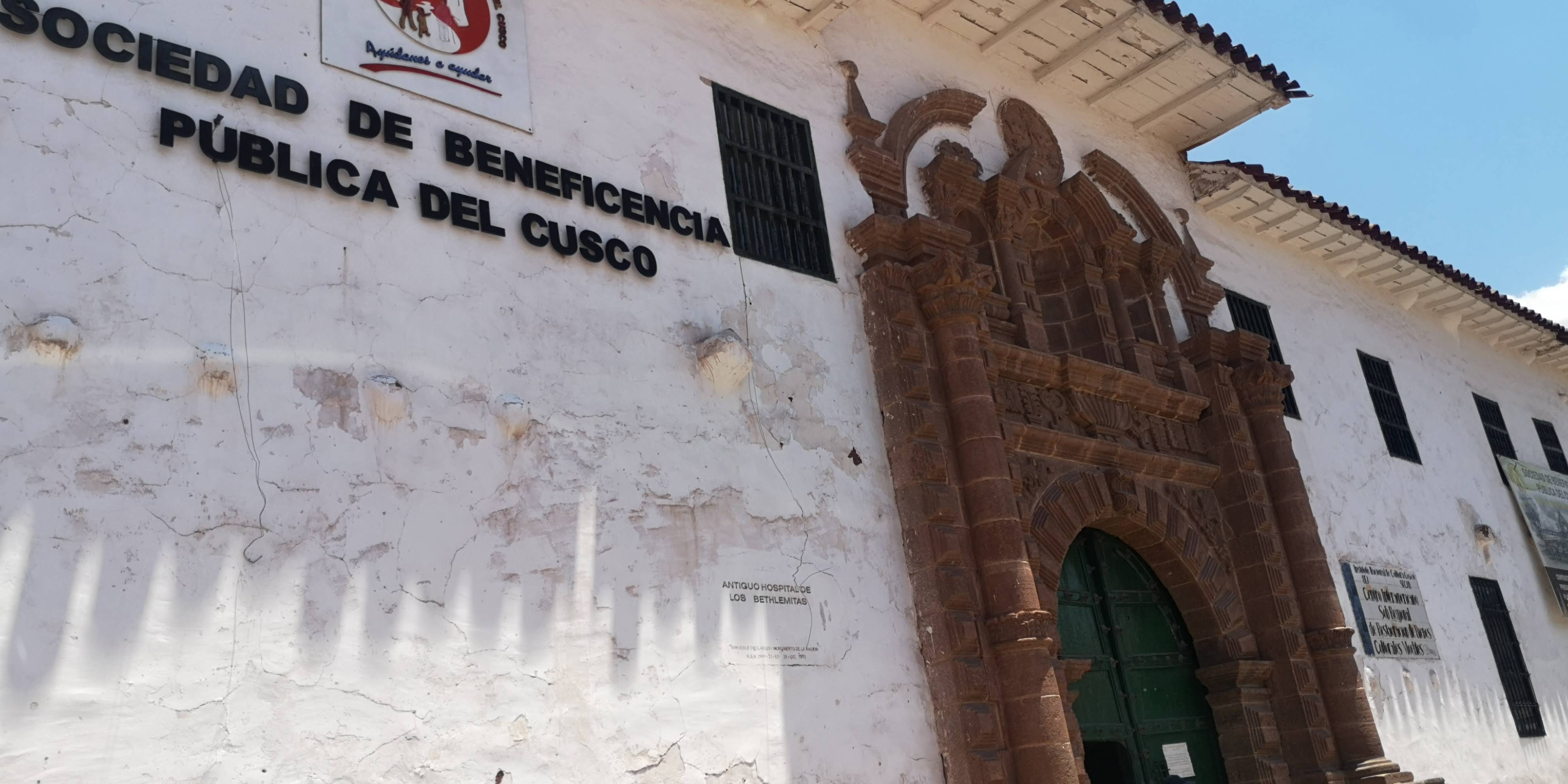 Vista del ingreso del hospital de la Almudena en Cusco, Perú